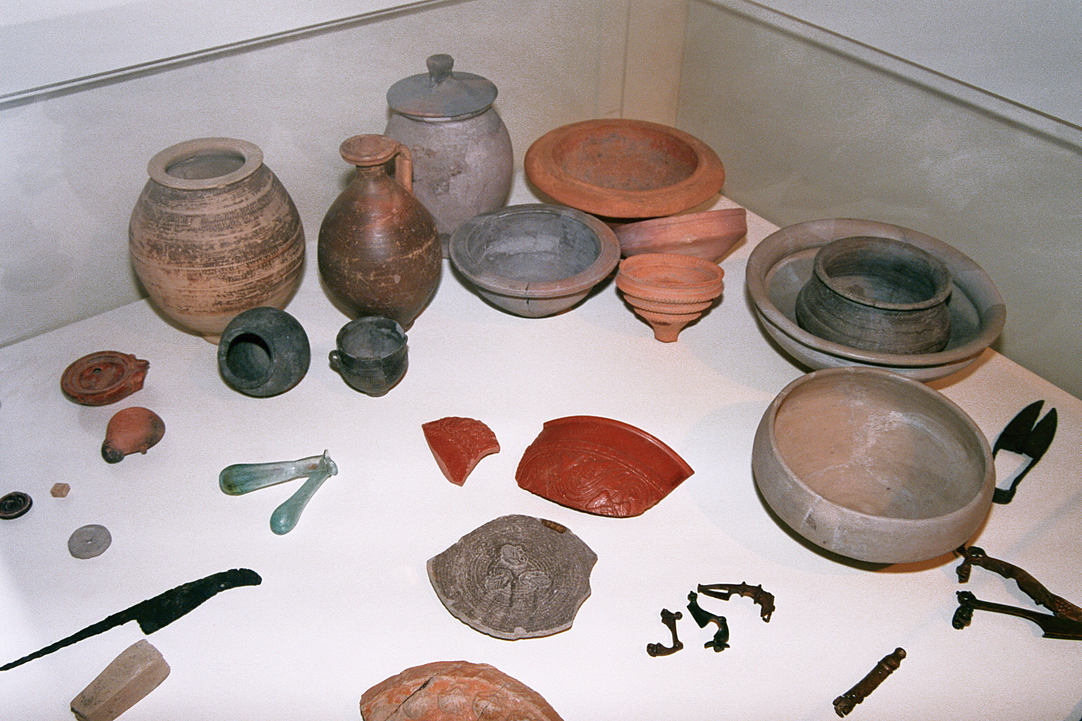 Esztergom (Gran), Ungarn: Römische Funde aus dem antiken Solva und seiner Umgebung, 2. bis 3. Jahrhundert n. Chr. Aufgenommen während der provinzialrömischen Sonderausstellung „Visegrád évszázadai – A római kor kezdete a Dunakanyarban“ die vom 19.08.2011 bis 20.07.2012 im Mátyás Király Múzeum (König-Matthias-Museum), Visegrád, stattfand.